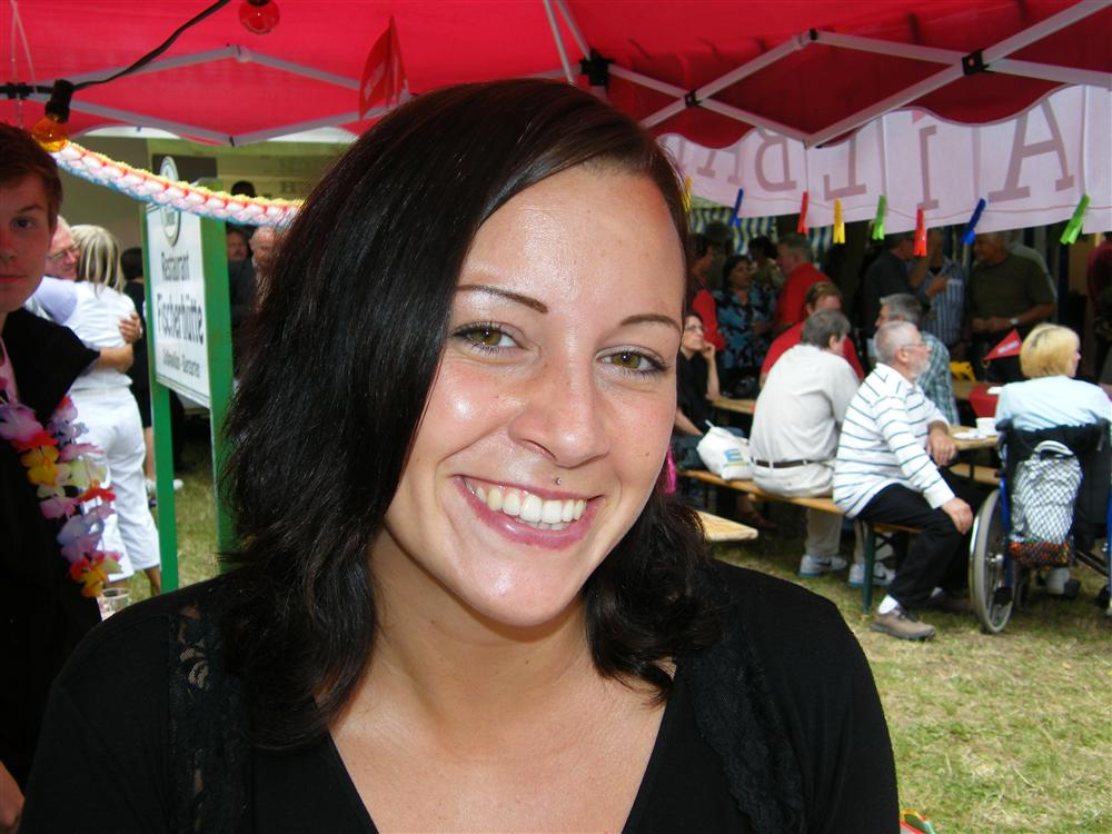 Sommerfest DIE LINKE. 2010